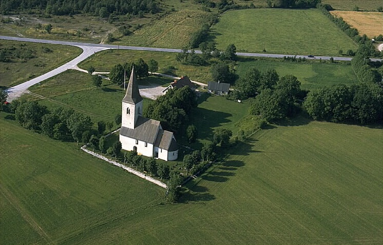 Motiv: Hejdeby kyrka Nyckelord: Flygbilder, Riksintressen Kategori: Kyrkomiljö Hejdeby kyrka. Länsväg 147 går förbi norr om kyrkan.